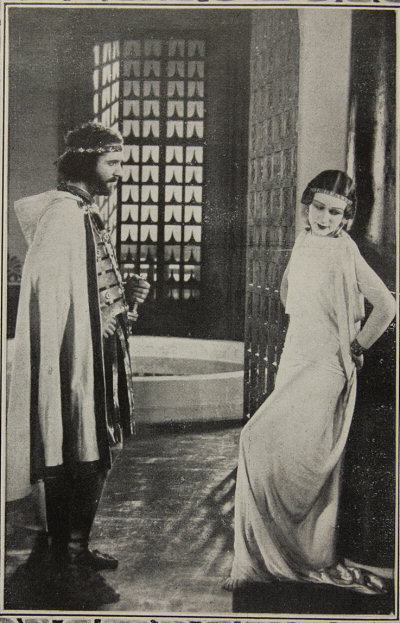 Foto di scena dalla brochure pubblicitaria, 1928. Coll. Museo Nazionale del Cinema, Torino.